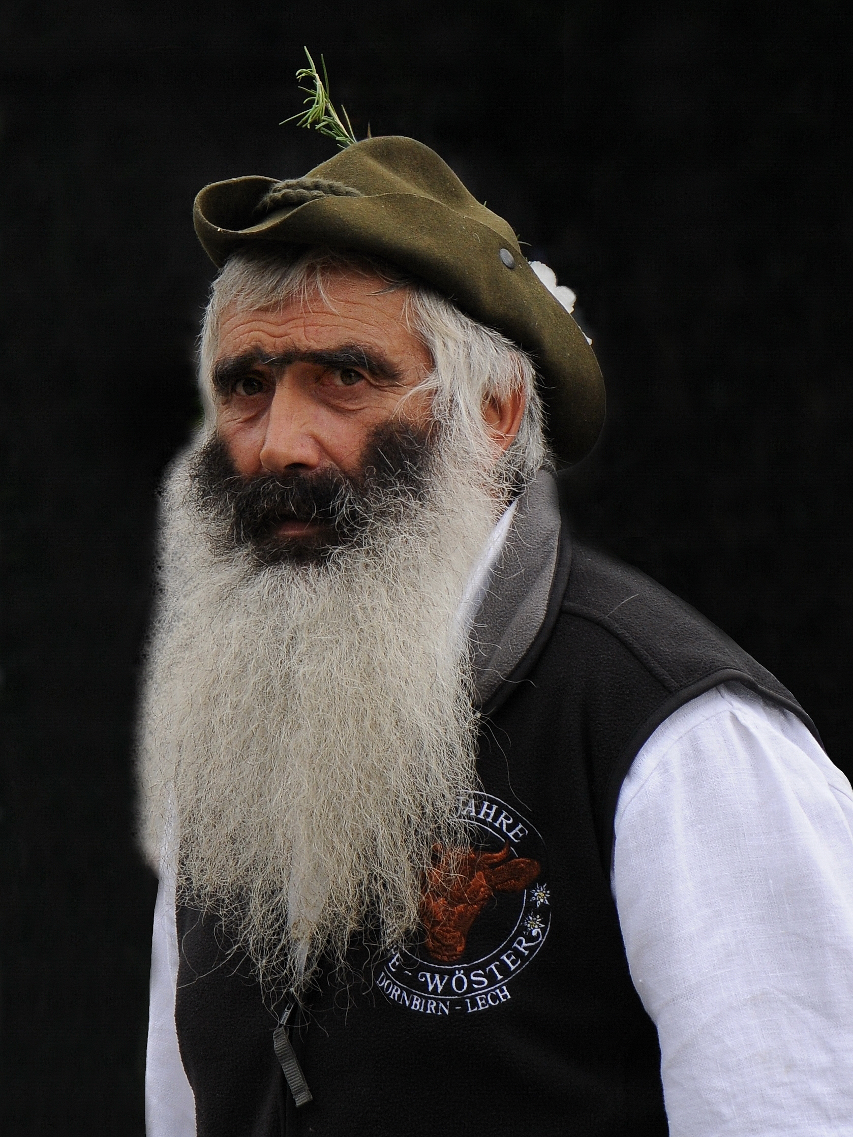 Alpmeister mit Emblem "600 Jahre Alpe Wöster", einer Hochalpe die auf über 2.100m gelegen, zur Stufe III der Dreistufenwirtschaft gehört. Erstmals im Jahre 1250 urkundlich erwähnt, schenkten die Brüder Mönch Konrad und Gotebold Anteile der Alpe dem Reichsstift Weingarten. Seit Dornbirner Bauern 1488 Anteile der Wöster-Alpe erwarben erfolgt der Auftrieb von Rindern und Schafen auf dem Weg vom Dornbirner First über den Bregenzerwald auf den Wöster.